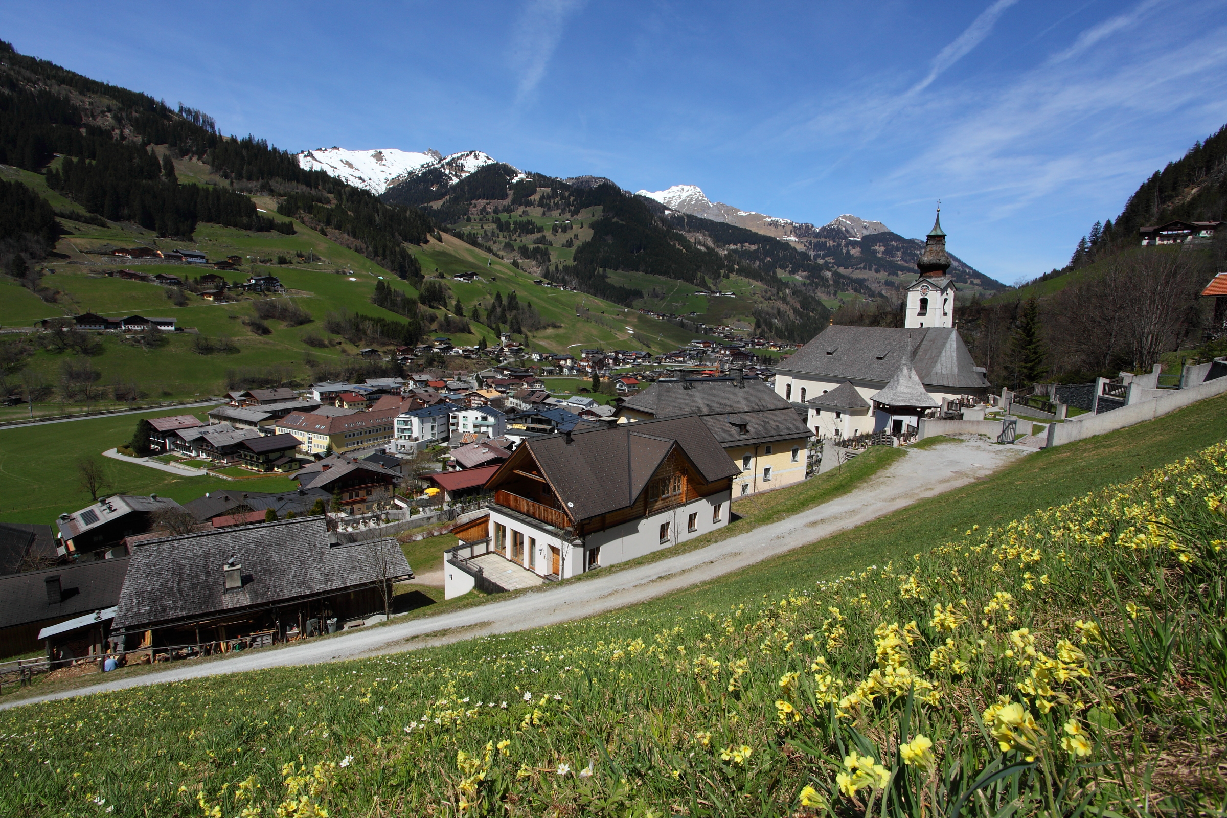 Die Pfarrkirche Großarl im Frühling, im Hintergrund Arlspitze und Höllwand der Ankogelgruppe.